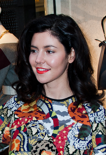 Fendi store opening - Marina Lambrini Diamandis